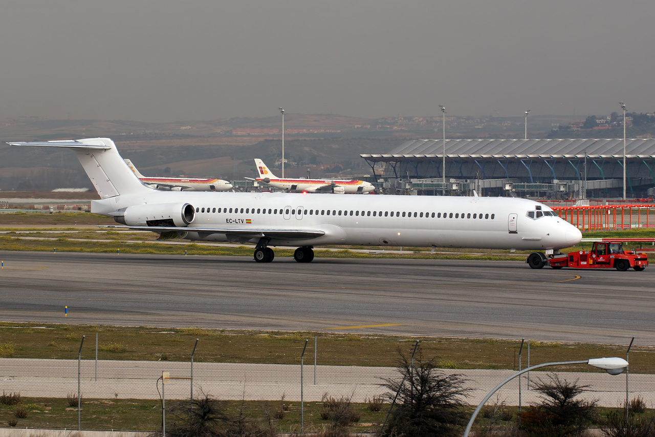 Madrid - Barajas (LEMD/MAD)